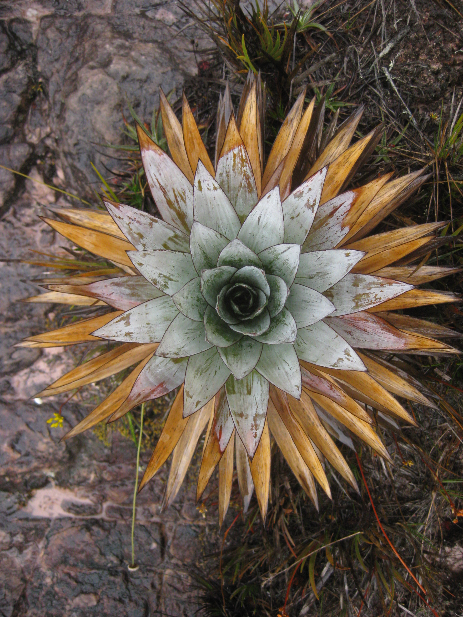 Orectanthe sceptrum, Mount Roraima, Venezuela